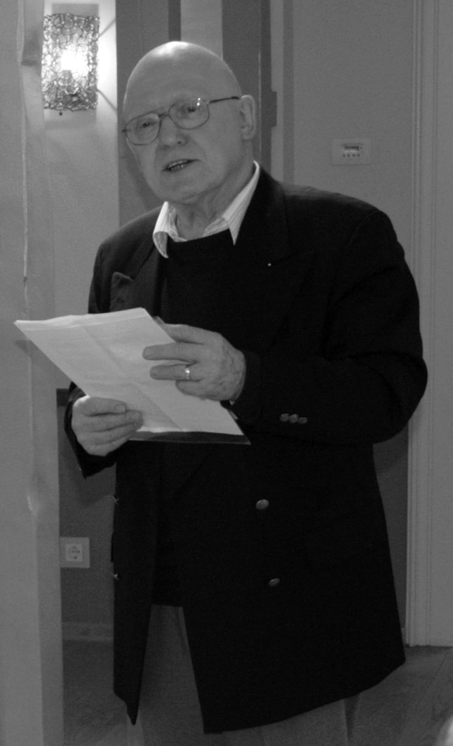 Schwarz-weiss Foto von Hinrich Rahmann (geb. 28.11.1935), 1973-2001 Professor für Zoologie, Universität Hohenheim (Stuttgart)